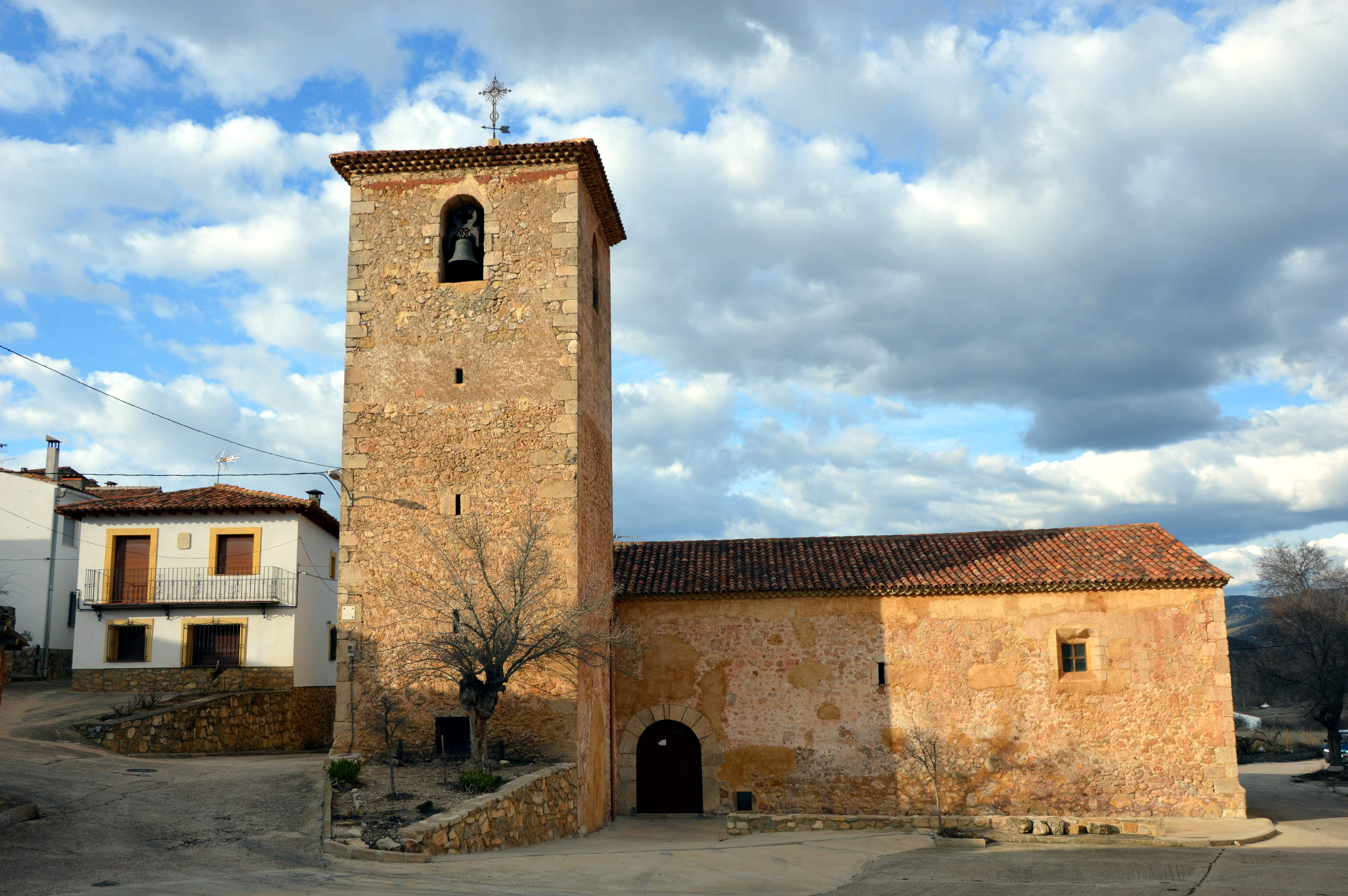 Vista frontal (meridional) de la iglesia parroquial de Ntra. Sra. de la Asunción en Alcalá de la Vega (Cuenca).